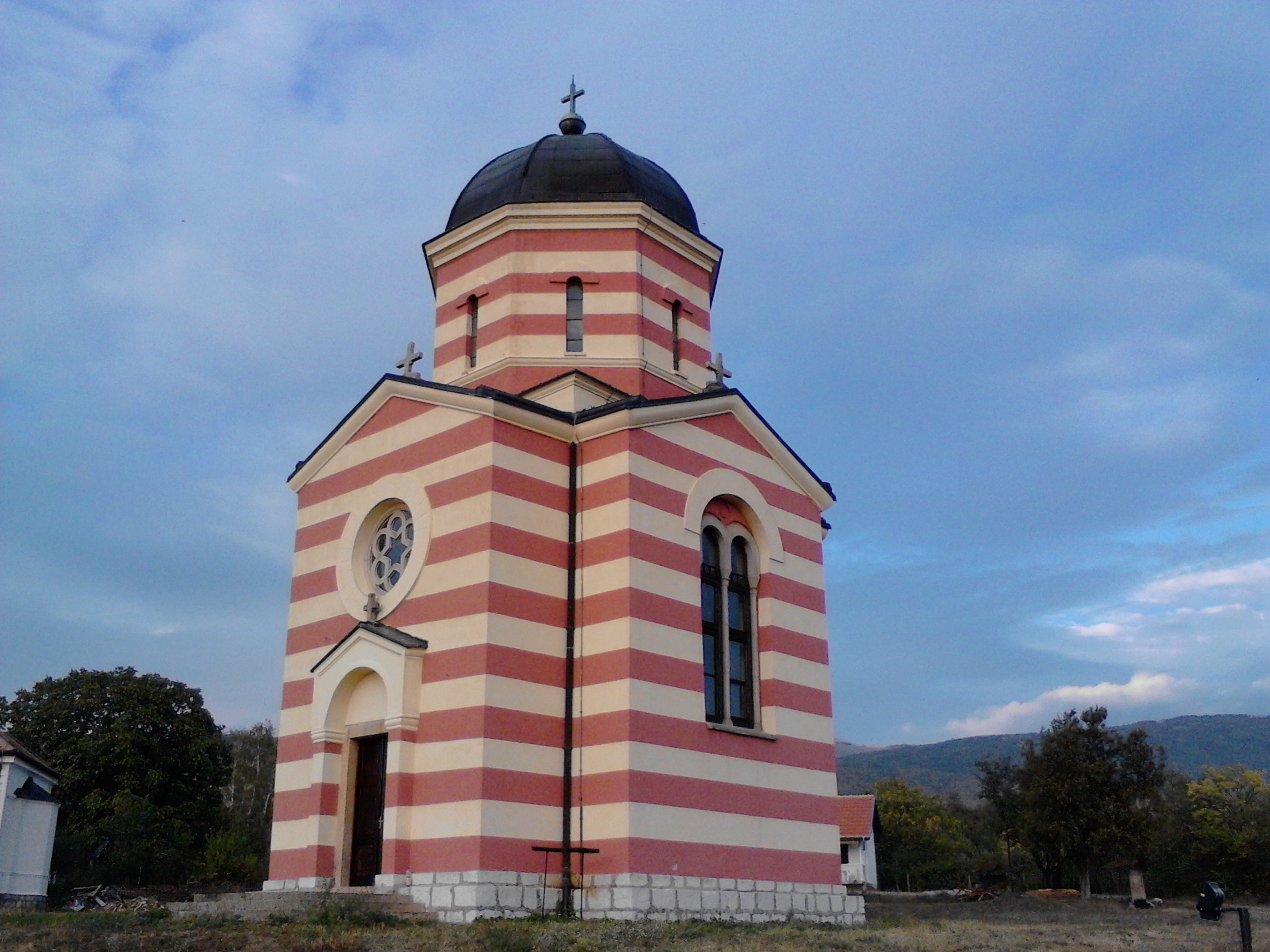 Crkva Svetog Jovana Glavoseka kod Krupca kod Pirota